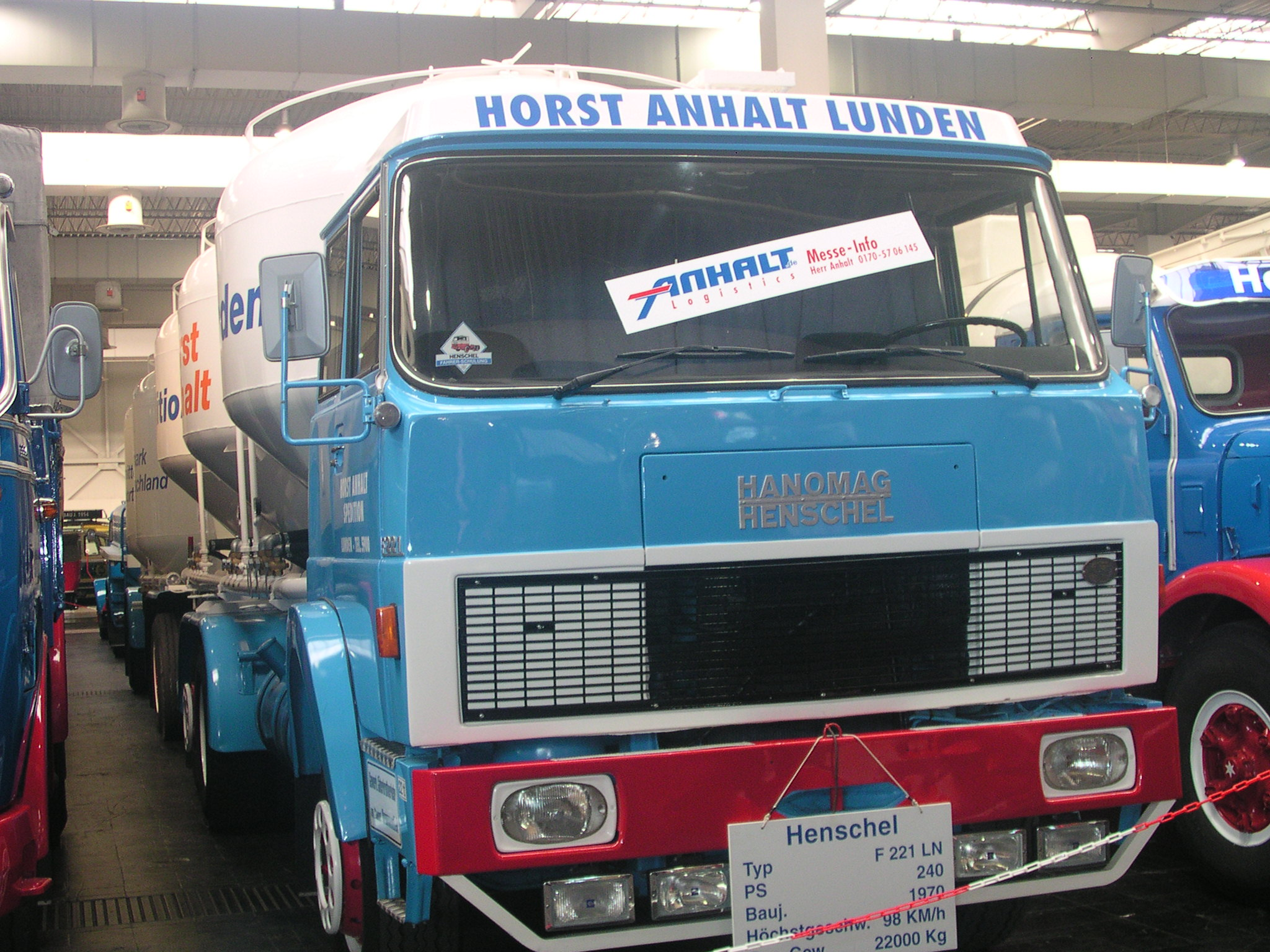 Henschel F 221 LN Silozug der Spedition Anhalt, Baujahr 1970, fotografiert bei der Internationalen Automobilausstellung in Hannover 2004